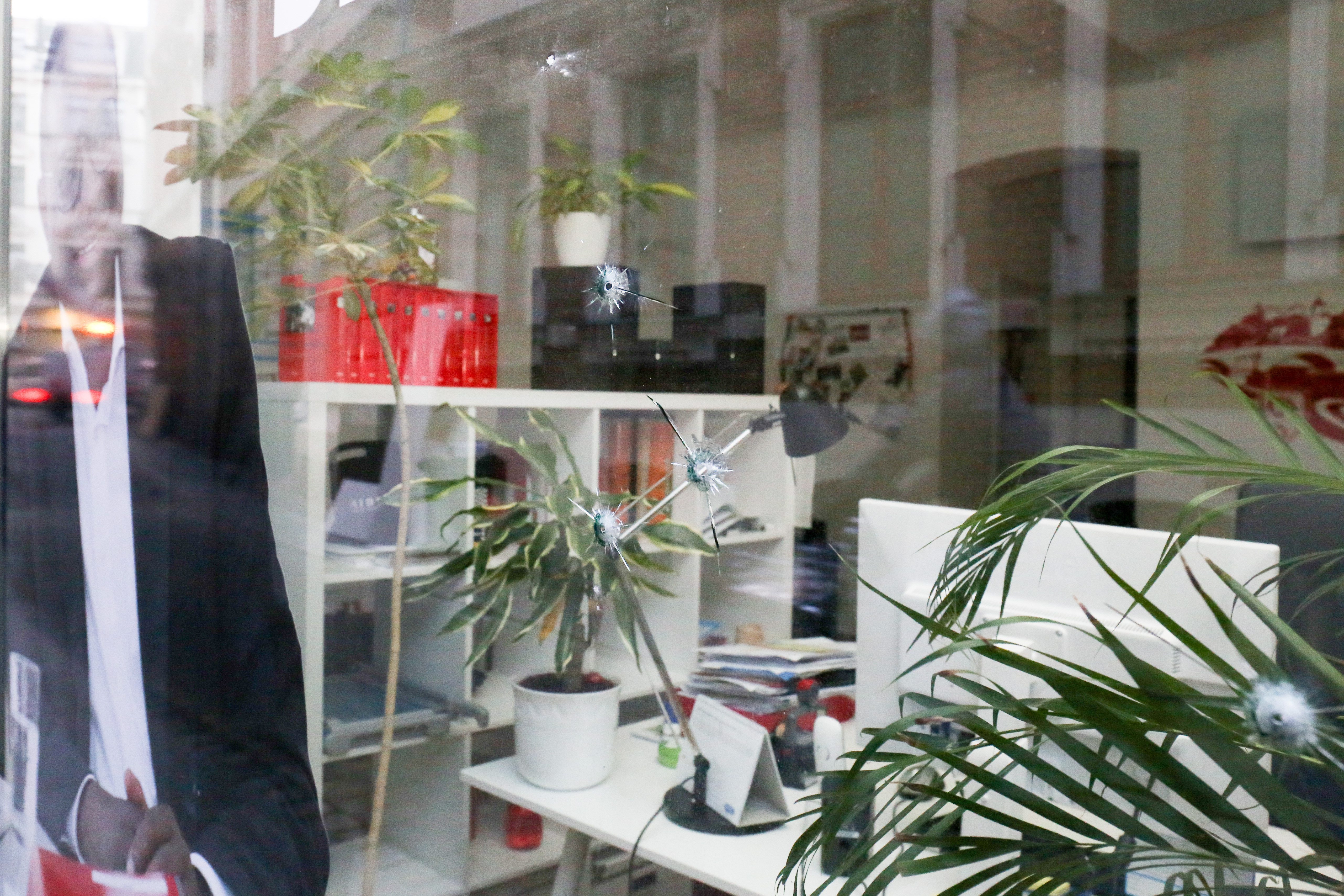 Einschußlöcher im Fenster des Wahlkreisbüros von Karamba Diaby. In der Nacht vom 14. zum 15. Januar 2020 wurden auf das Büro des Abgeordneten in der Kleinen Ulrichstraße 24a in Halle Schüsse abgegeben.